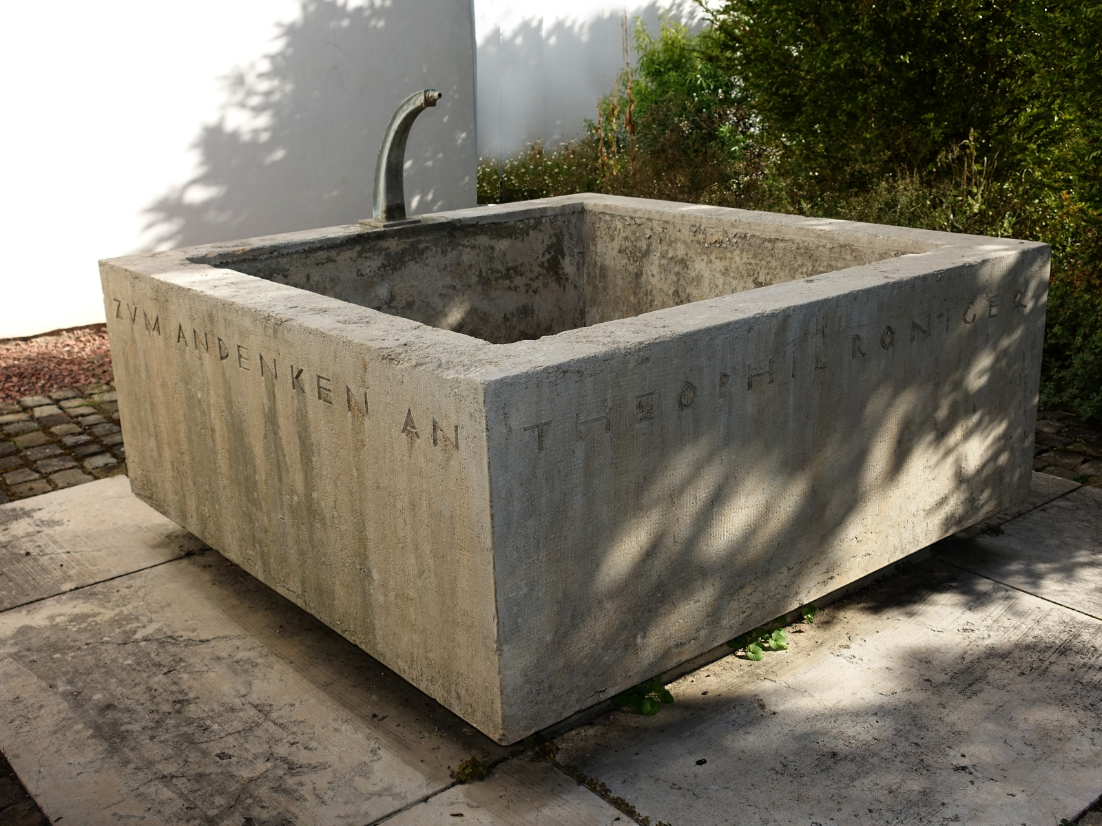 Magden, Christkatholische Kirche St. Martin. Gedenkbrunnen für Theophil Roniger (1844–1913), Bierbrauer, Gründer der Brauerei Feldschlösschen, Politiker